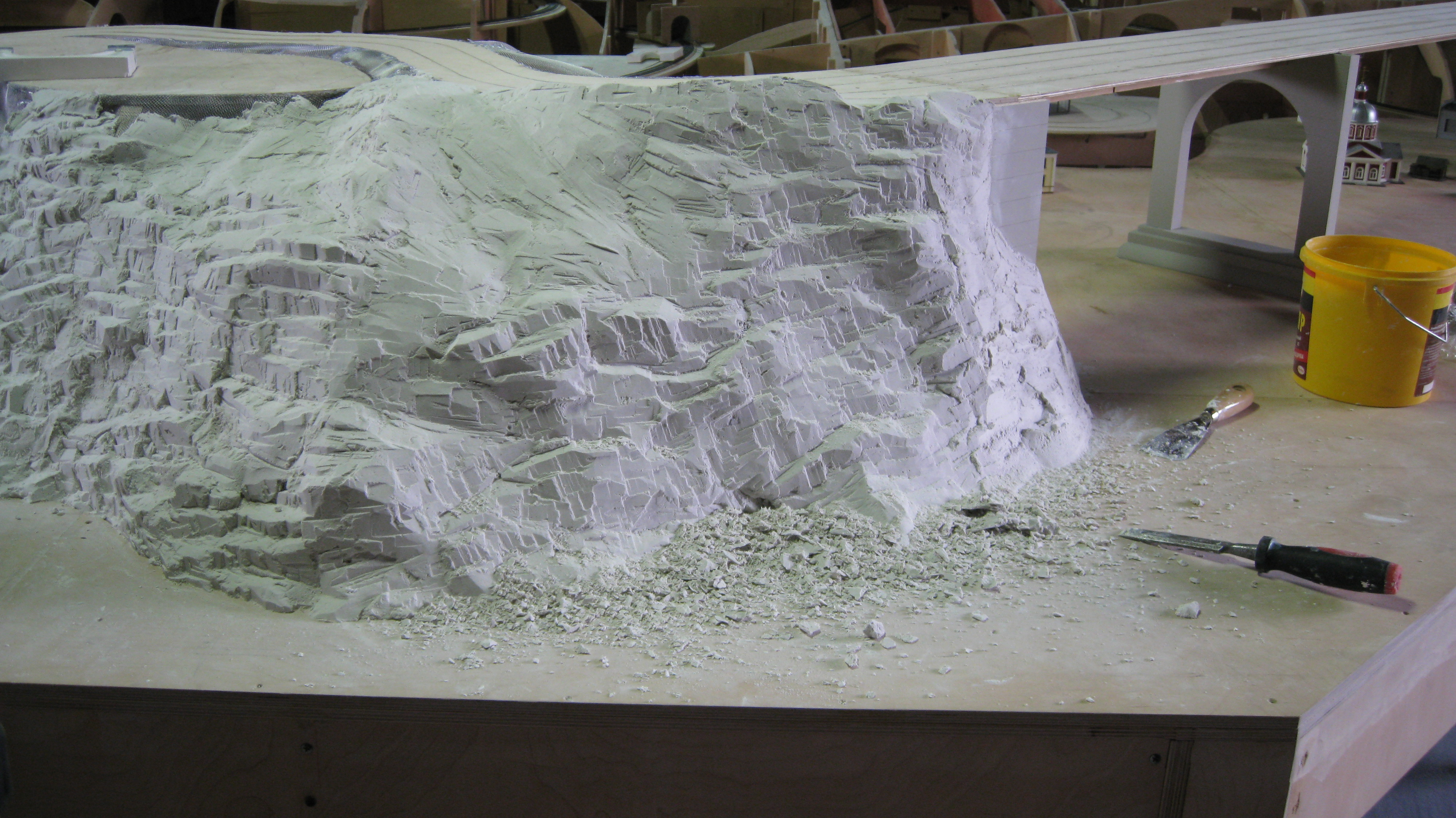 Создание ландшафта